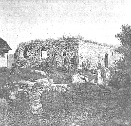 Ruševine gradu Kunčen leta 1900